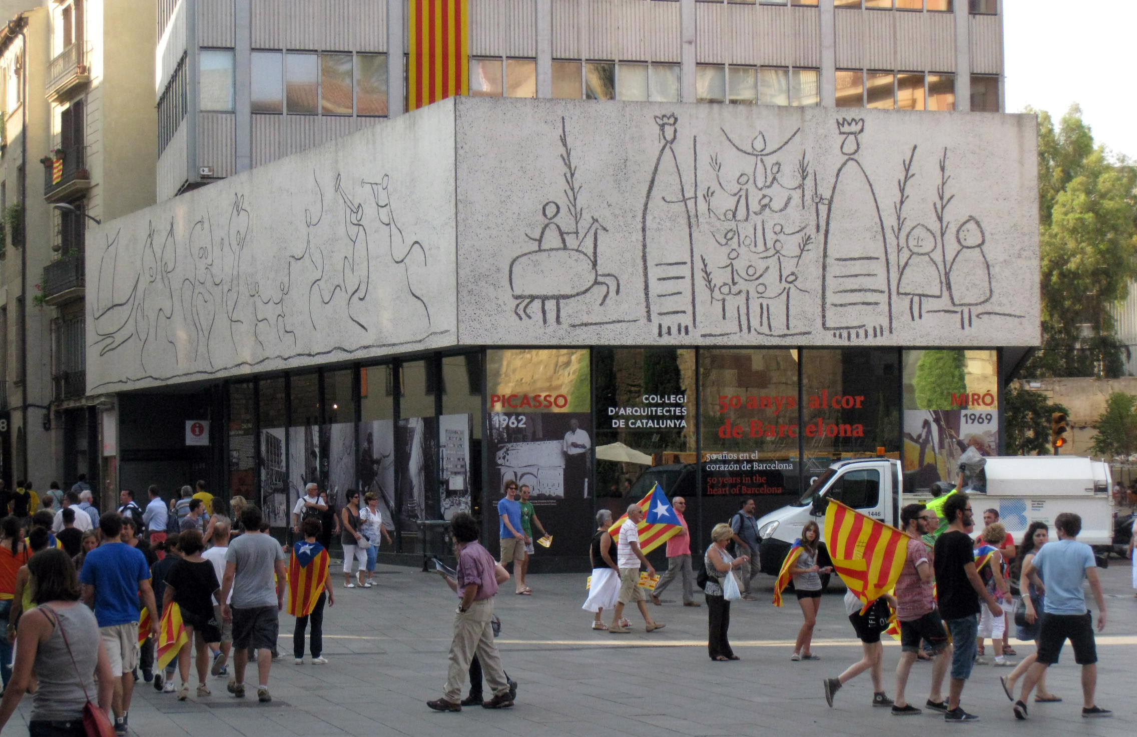 Esgrafiats de Picasso. Pl. Nova, 5 (Barcelona).